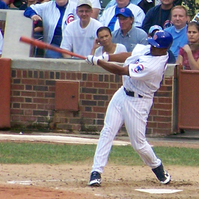 Jacque Jones